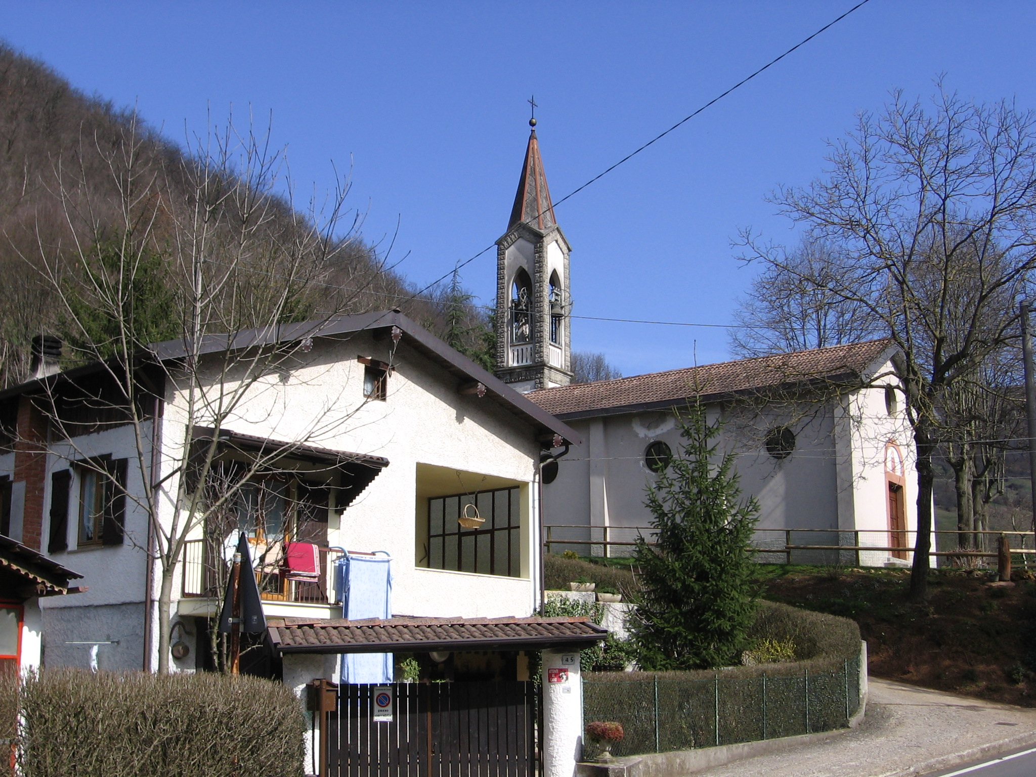 Cene, Bergamo, Italia